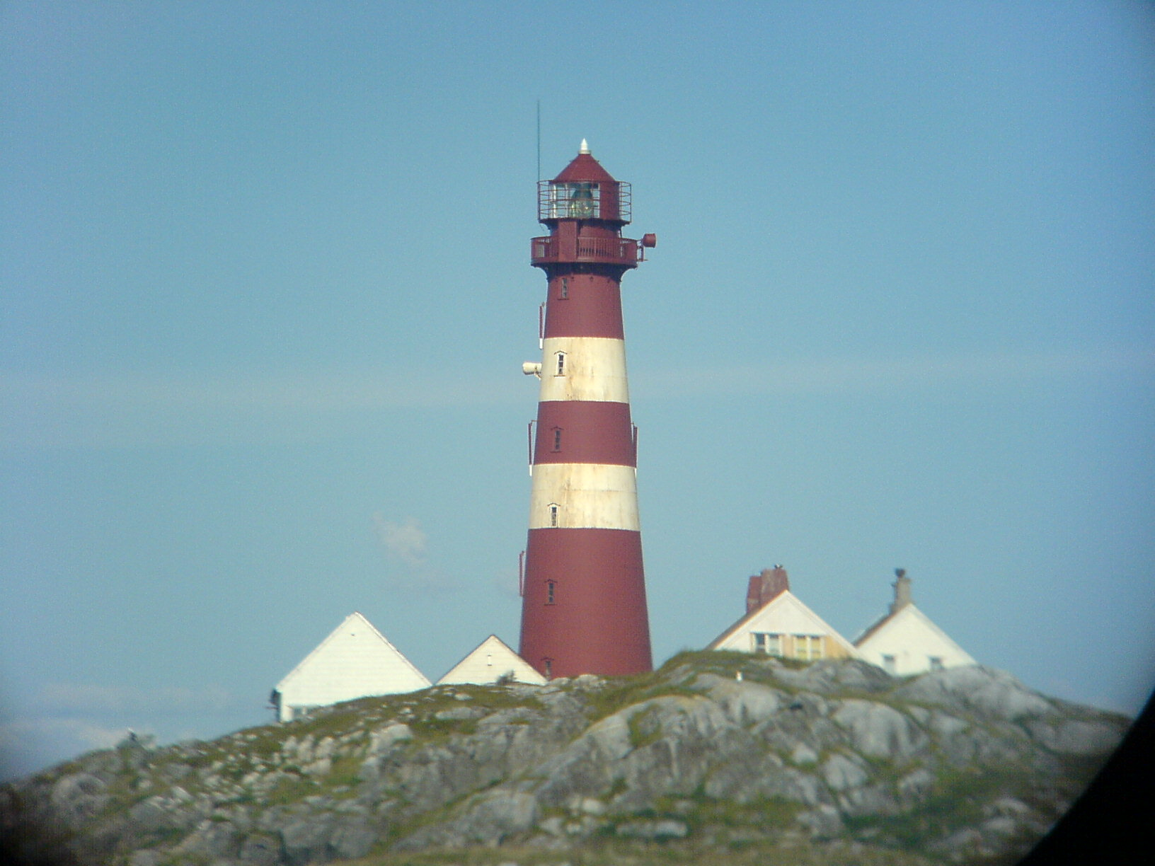 Landegode Fyr utenfor Bodø, sett fra vest